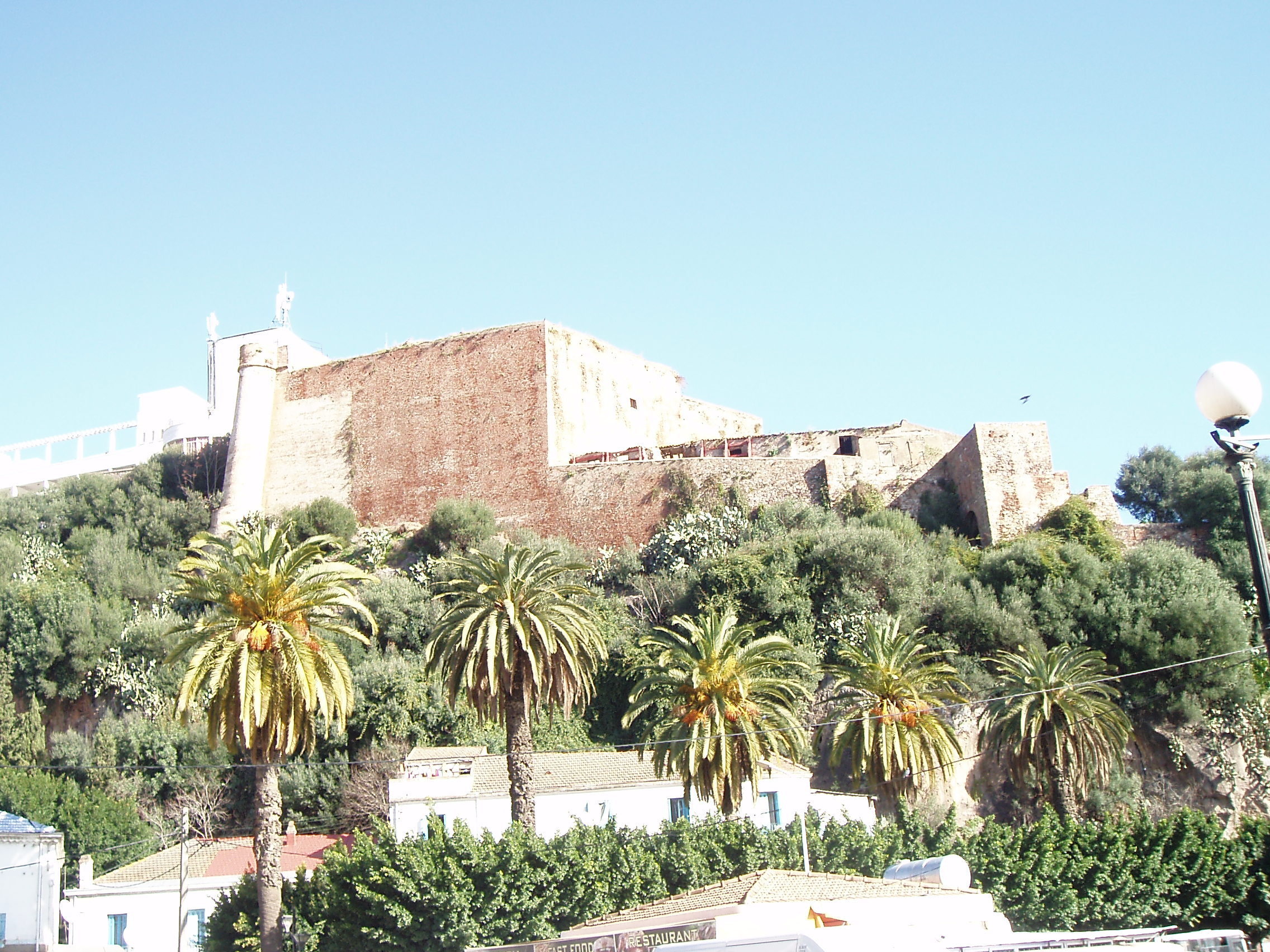 برج الرومان للمراقبة ببجاية